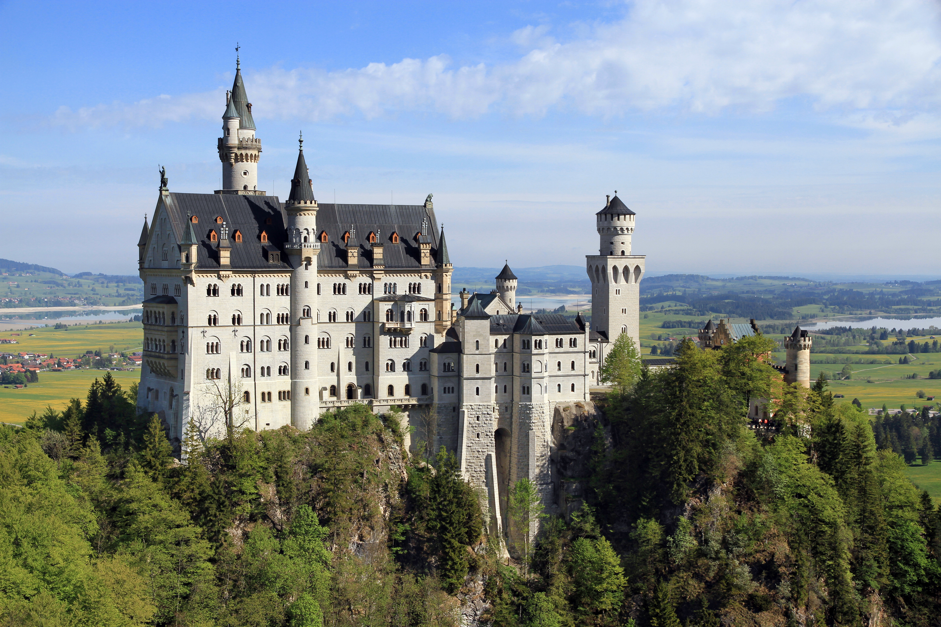 Neuschwanstein Castle, Bavaria, Germany in 2011 May.